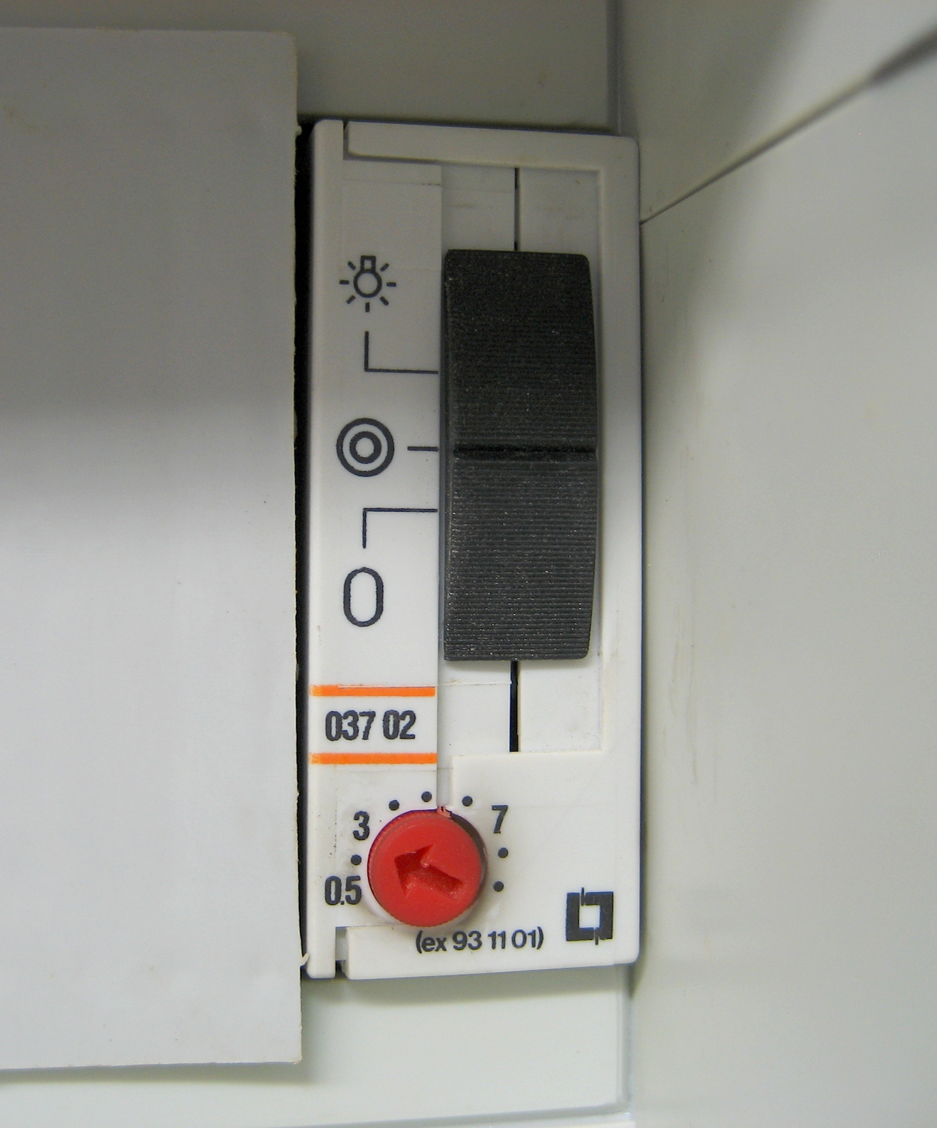 Treppenlicht-Zeitschalter, hier eingestellt auf 3 Minuten. Schalterstellung unten: aus, Mitte: Zeitautomatik, oben: Dauer-Ein